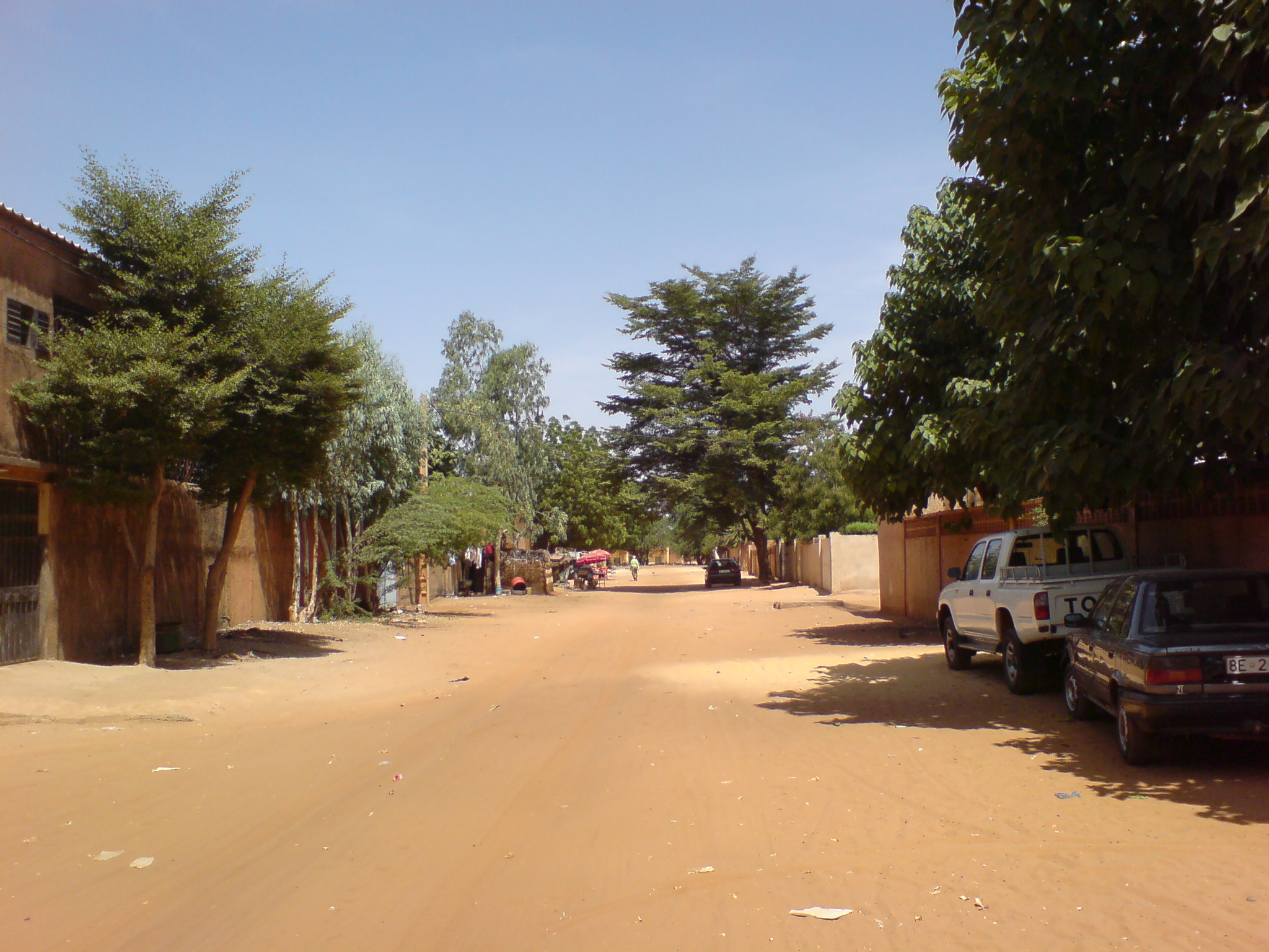 Niamey, Niger